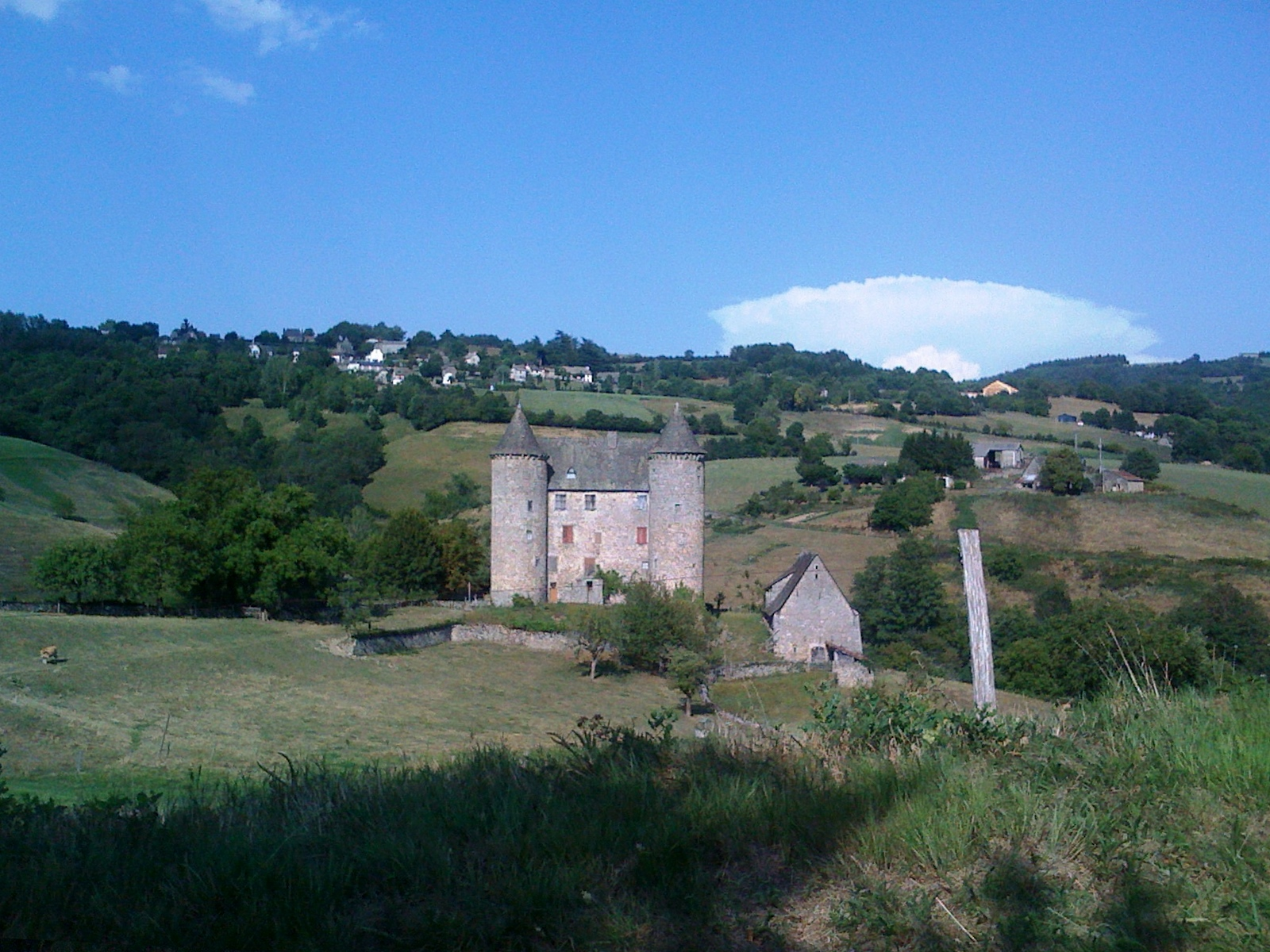 Château de Sénezergues